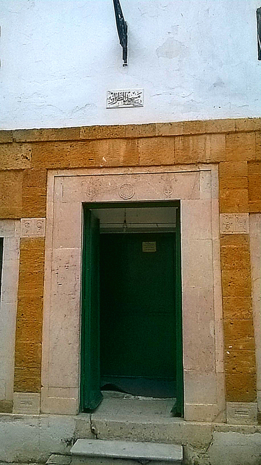 La médina de Tunis مدينة تونس العتيقة